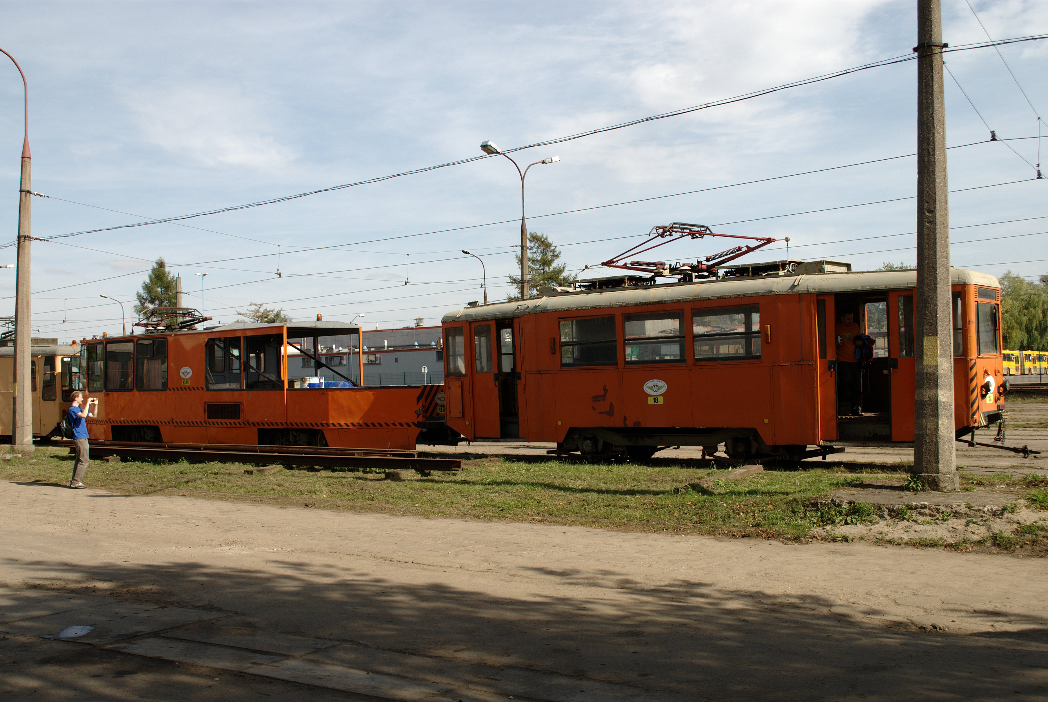 Gliwice. Składy 18R i 135R.